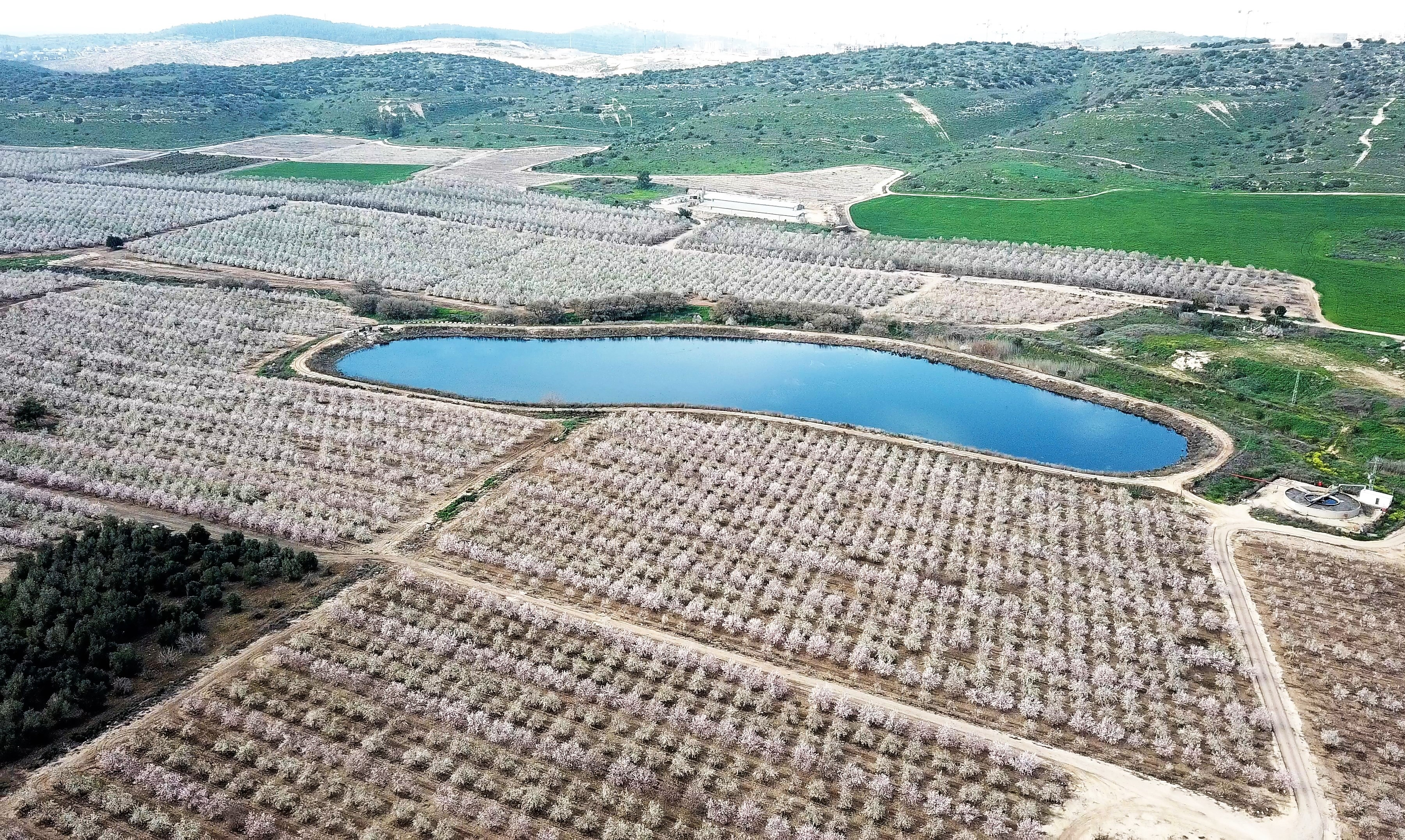 פריחת השקד סביב האגם בסמוך לבית שמש. 2020